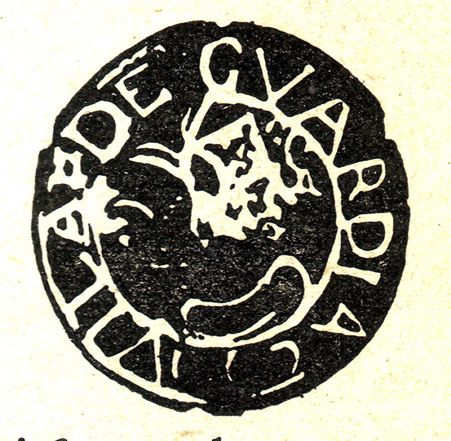 Segell municipal de l'antic ajuntament de Guàrdia (Guàrdia de Noguera, Castell de Mur, Pallars Jussà)